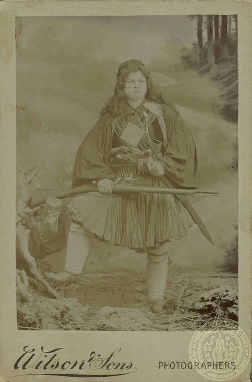 Гръцката андартска четничка Теодора Стефанова от Орехово, Битолско